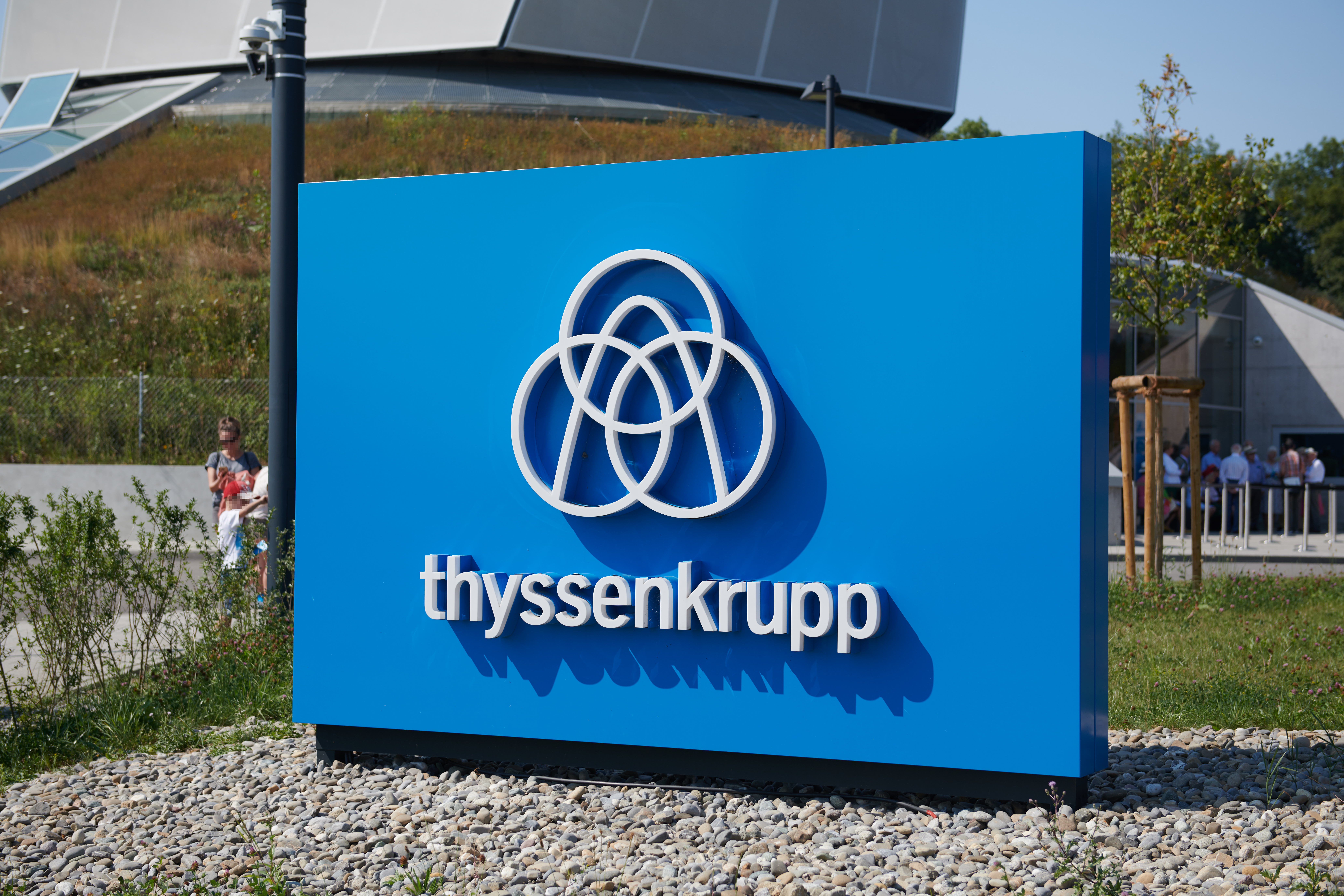 Thyssenkrupp Aufzugstestturm, Eingangsbereich